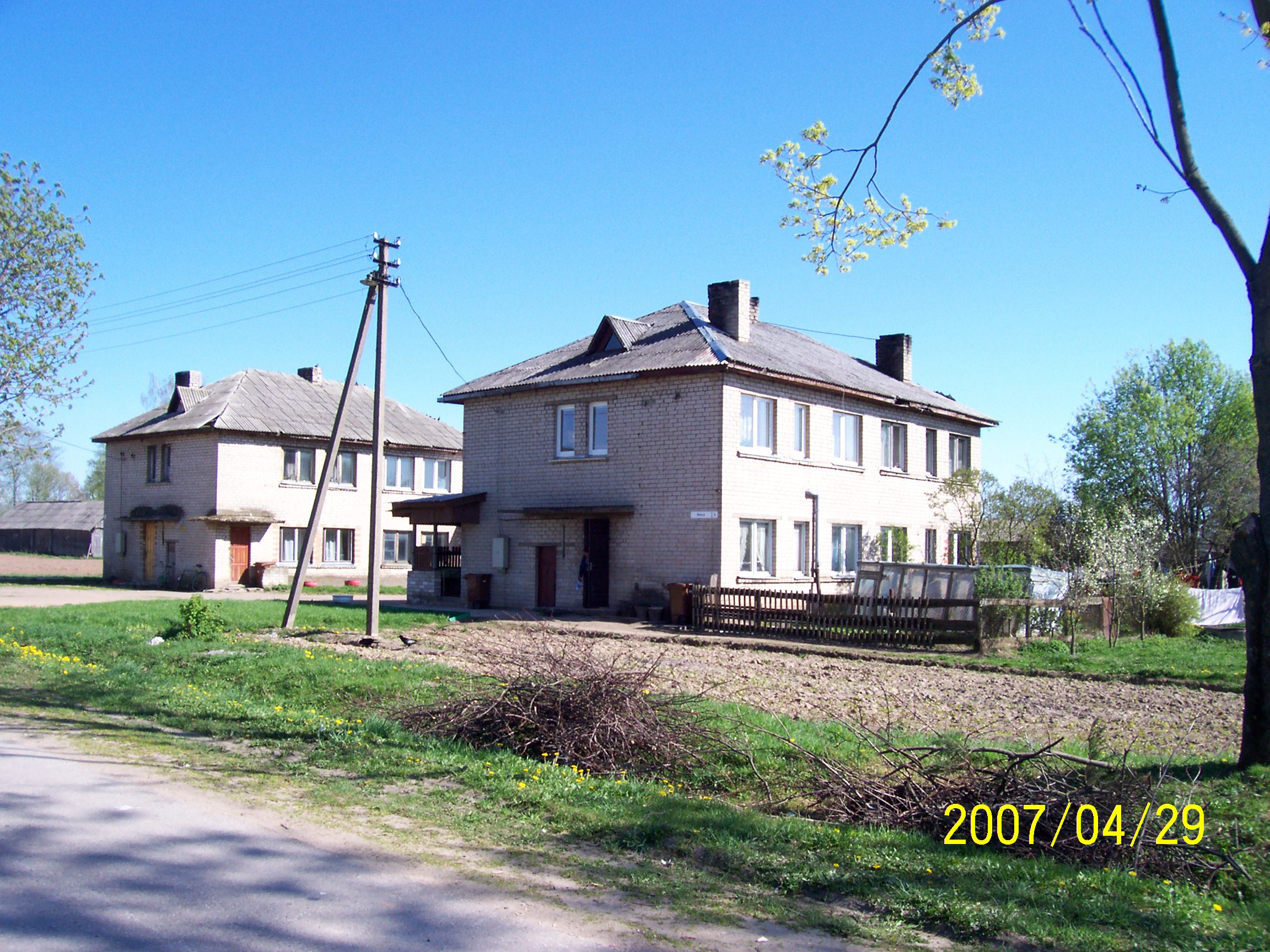 Ručiūnai, Jonavos r.